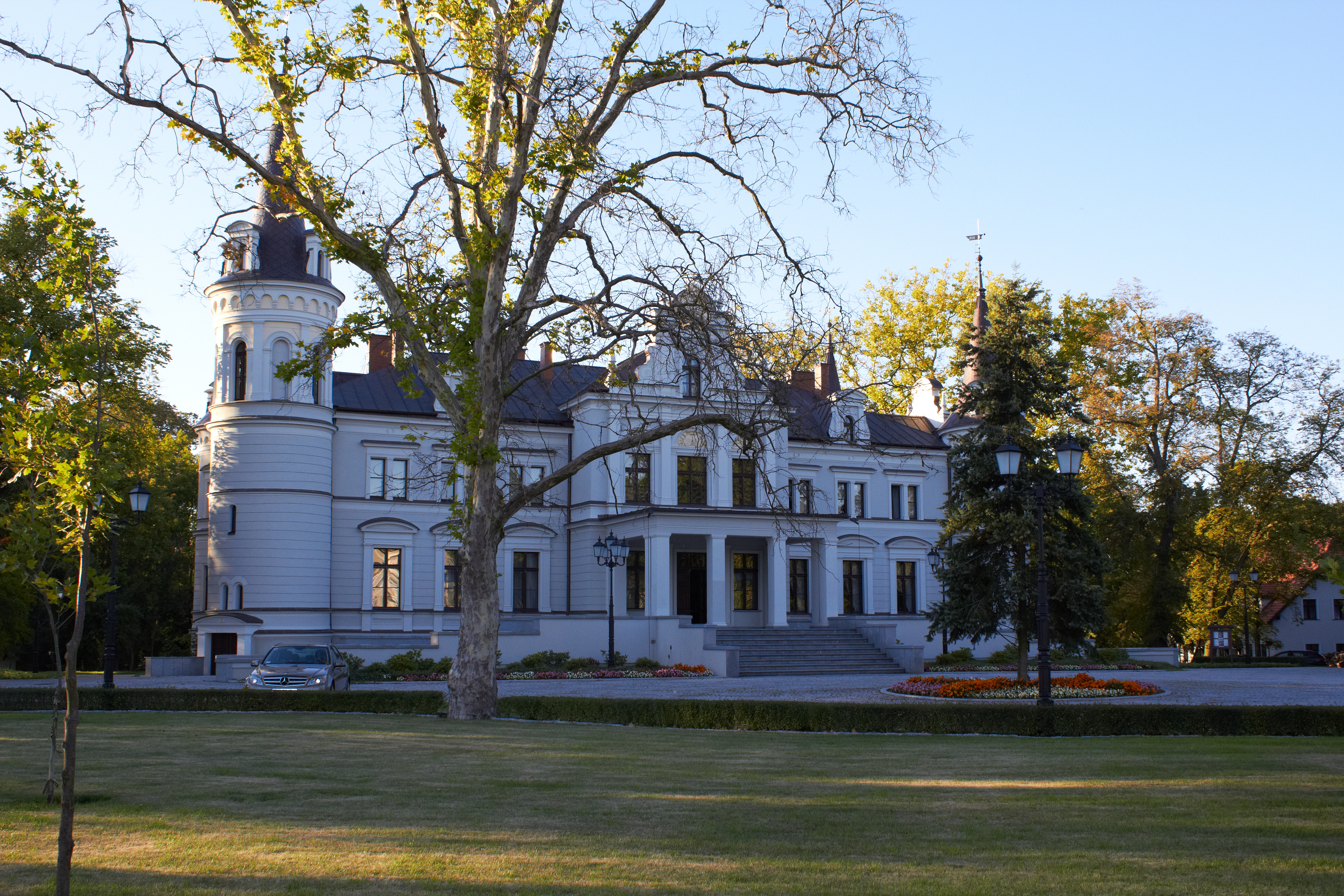 Tarce, zespół pałacowy, XIX